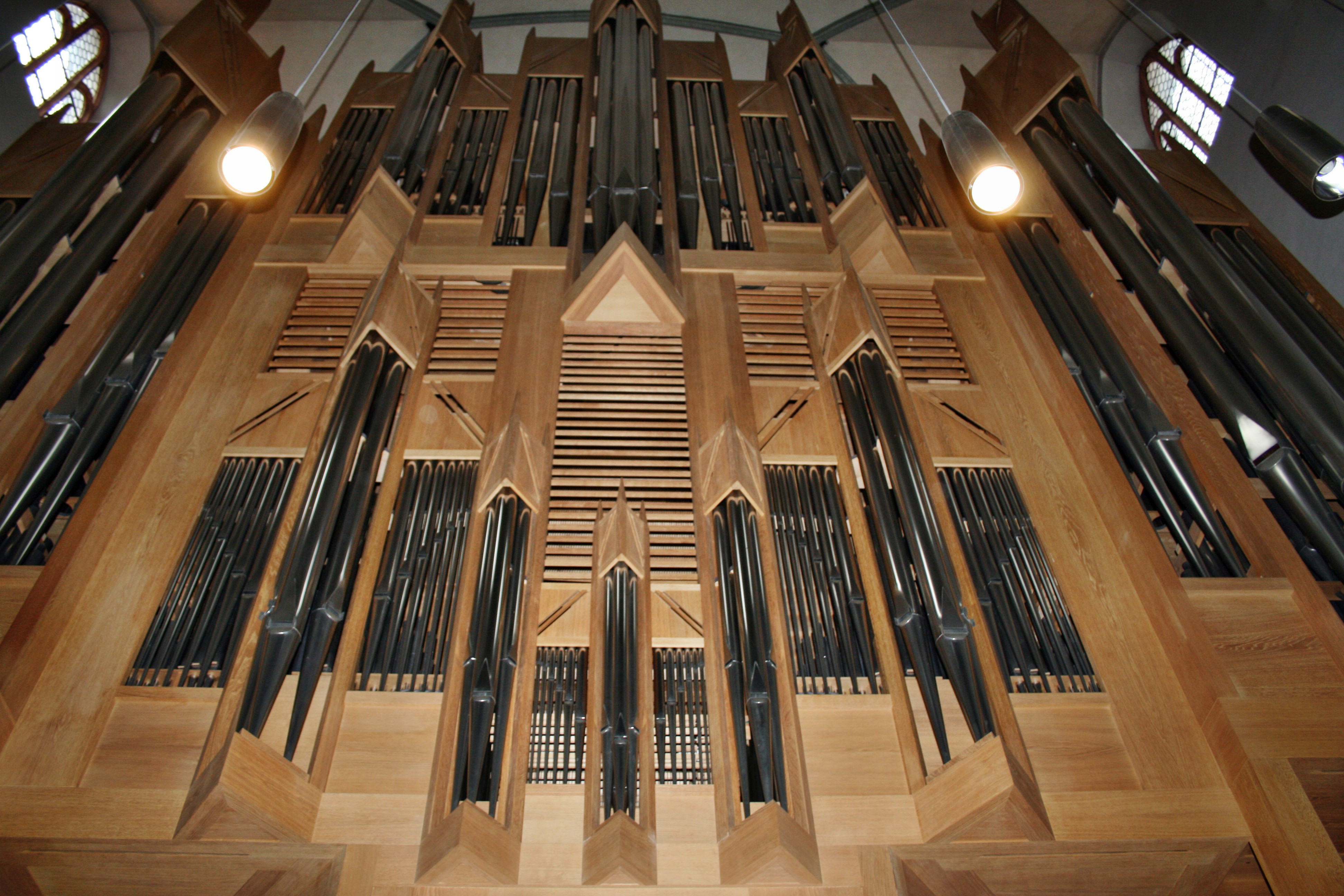 Die Gollorgel in St. Martin von 1998, die größte, welche der Orgelbauer bisher gebaut hat